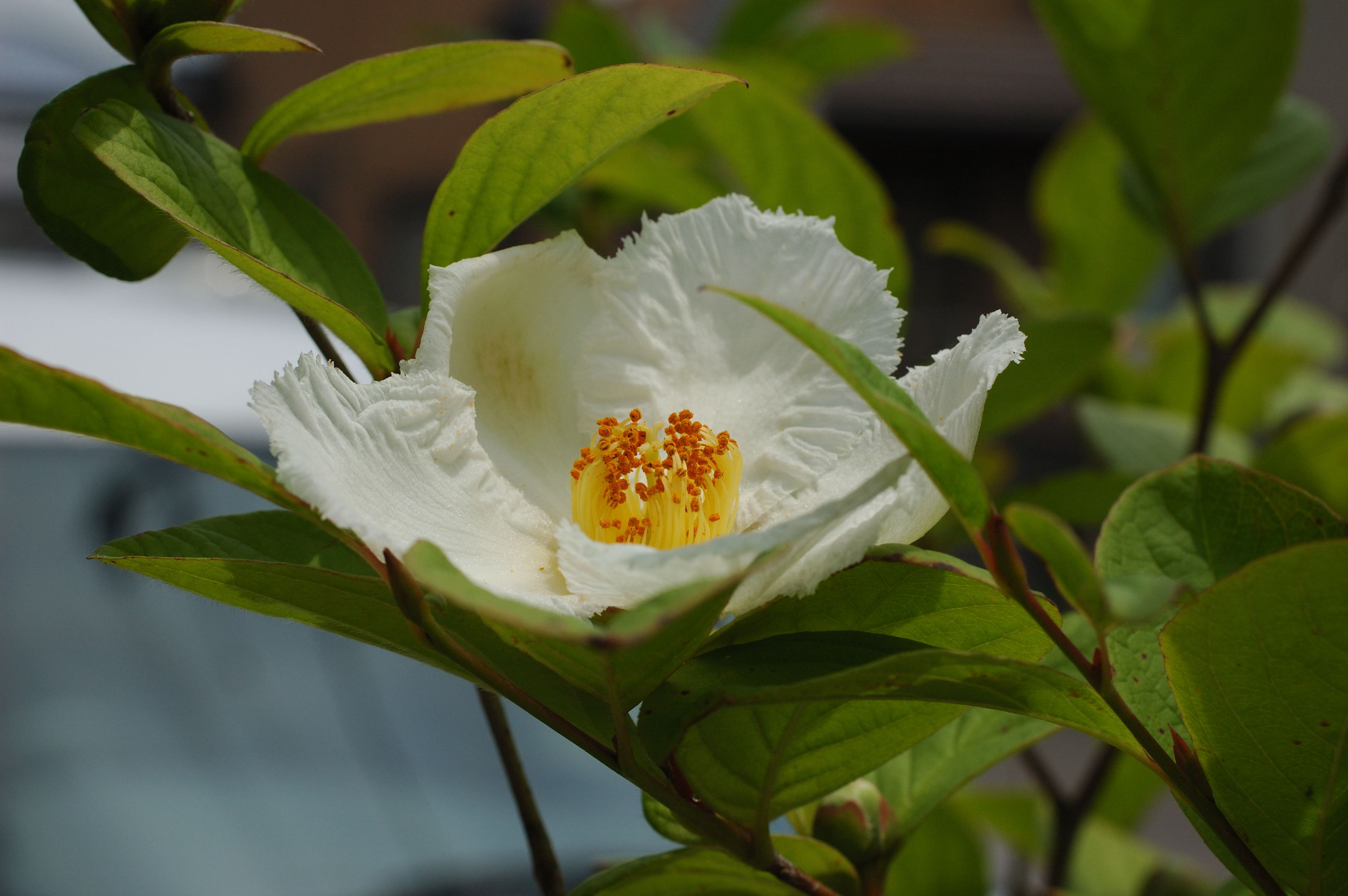 Stuartia pseudocamellia